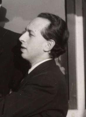 Achondroplasie, kleine mensen, dwergen, lilliputters. Dhr Keizer, de kleinste man van Nederland (98 cm) is 65 jaar oud geworden, Loosduinen, Nederland 1939. Foto: Dhr Keizer spreekt op zijn 65e verjaardag voor de radio, de AVRO radio-reporter Gustav "Gustaaf" Czopp houdt hem een microfoon voor, terwijl hij op de arm gehouden wordt. Collectie / Archief Het Leven (LEVEN 022)